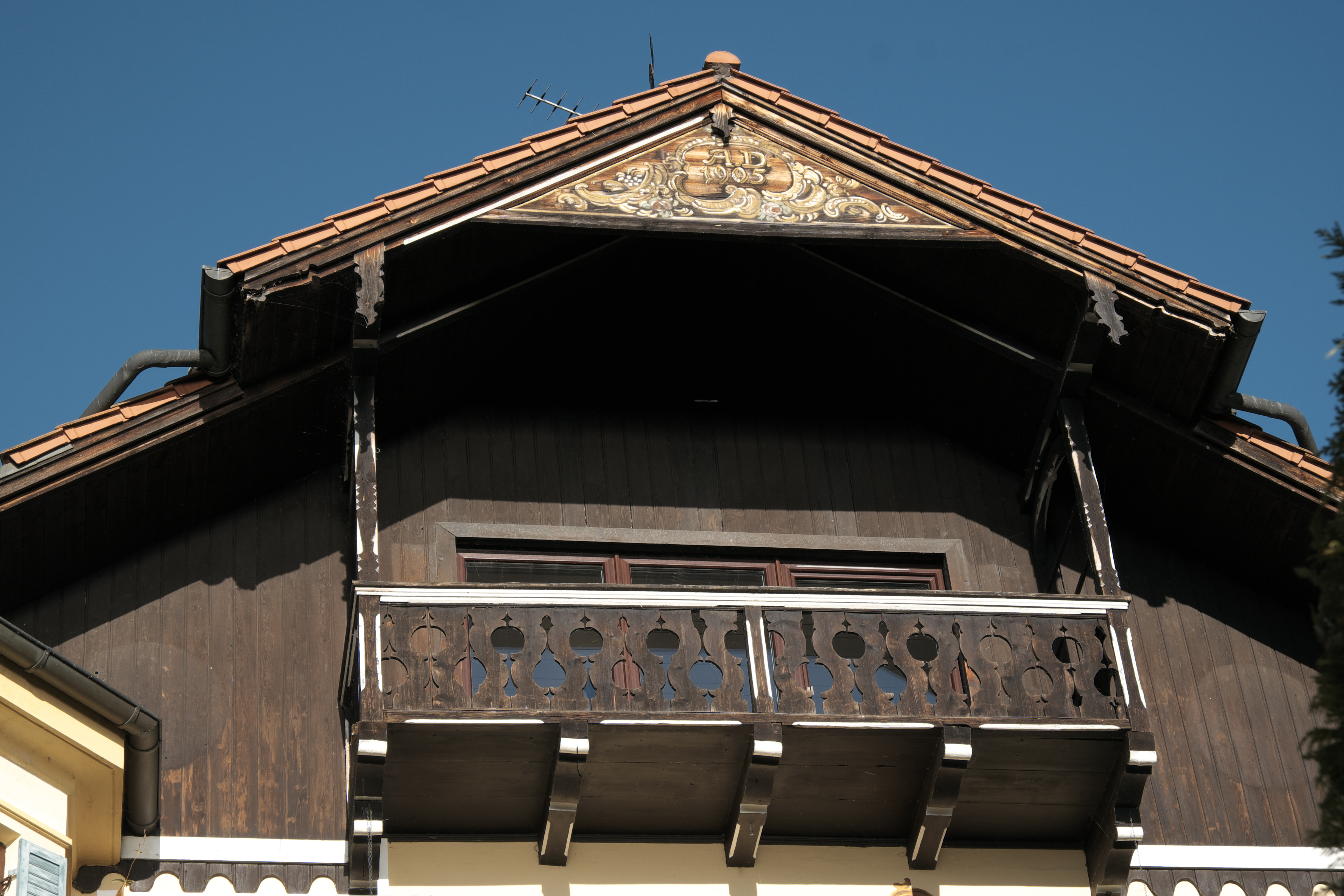 Landhaus in der Seestraße 12 in Unterschondorf (Schondorf am Ammersee) im Landkreis Landsberg am Lech (Bayern/Deutschland)